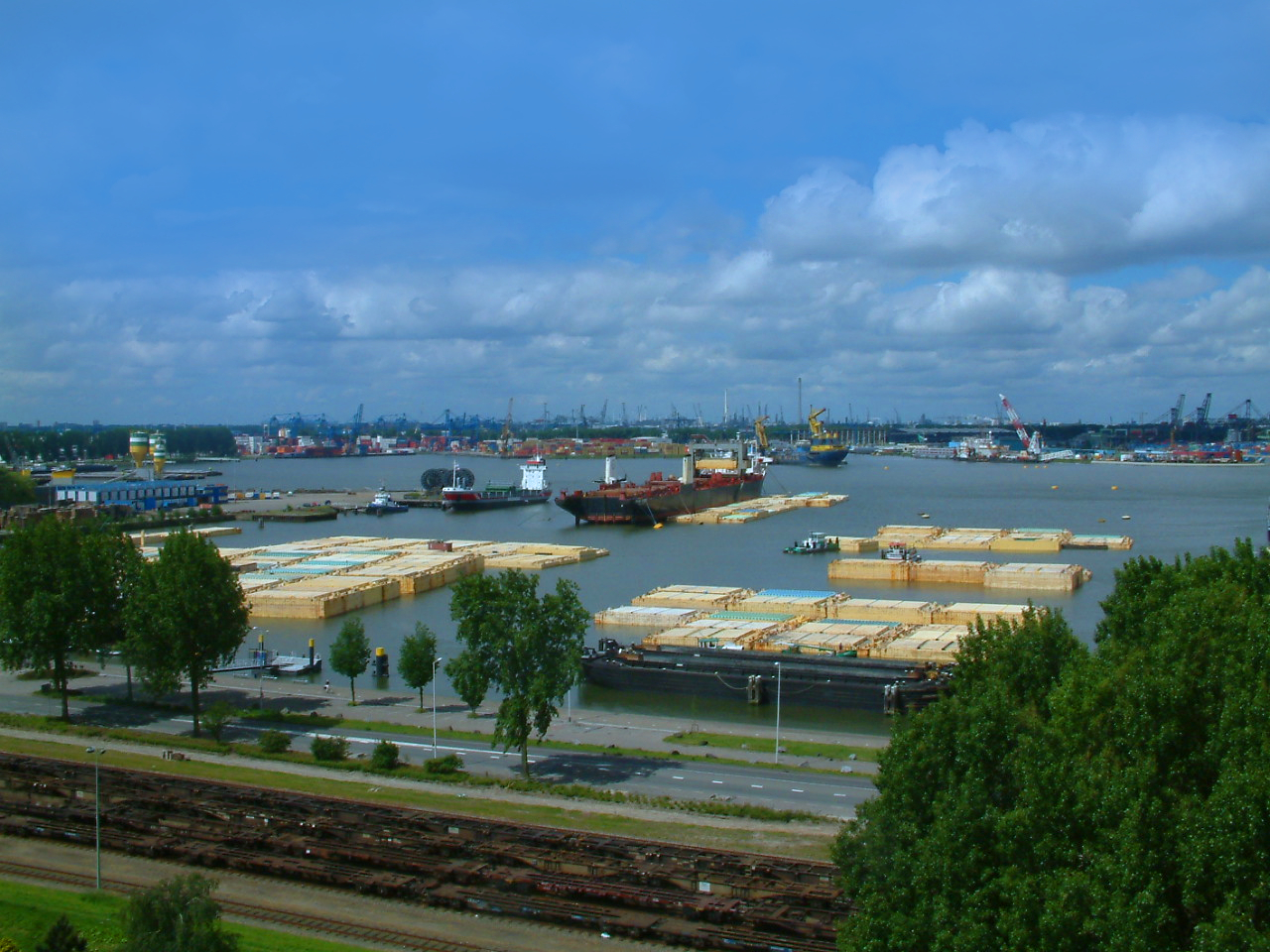 Lashbakken in the Waalhaven at Rotterdam, from the 12th floor of Waelestein, Schulpplein, Charlois